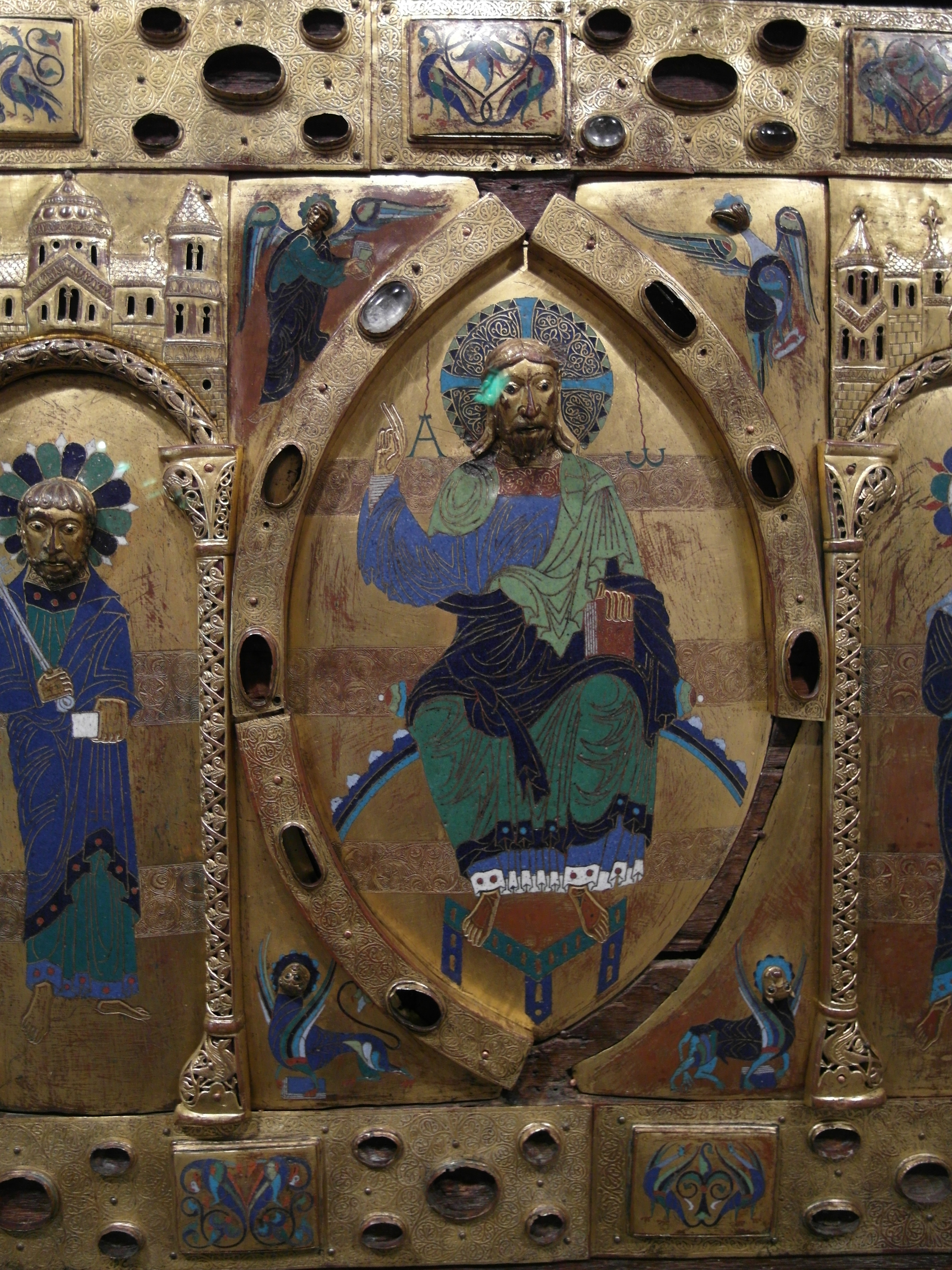 Urna de Santo Domingo, taller de Silos, hacia 1165-1170. Del monasterio de Santo Domingo de Silos. Museo de Burgos.